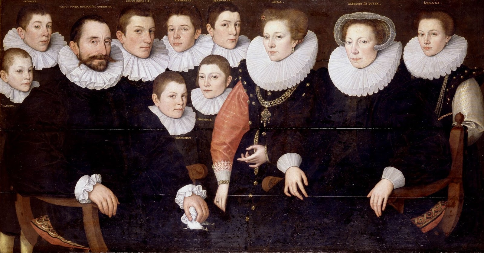 Portretgroep van Jan van der Does en zijn gezin. Van links naar rechts: Jacobus van der Does (1584-?); Joris van der Does (1574-1599); Johan van der Does de Vader (1545-1604); Johan Van der Does de zoon (1571-1596); Werner van der Does (1578-1603); Steven van der Does (1576-1622); Dirk Van der Does (1580-1663); Frans van der Does (1577-1630); Anna van der Does (1572-1635/39); Elisabeth van Zuylen (1545-1624); Johanna van der Does (1579-1601).